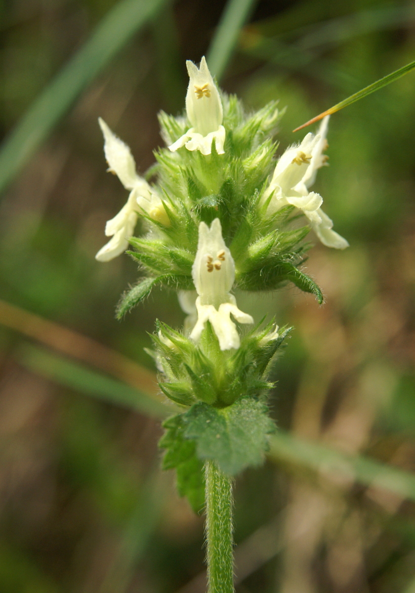 Jacquinov čistec na Toscu.